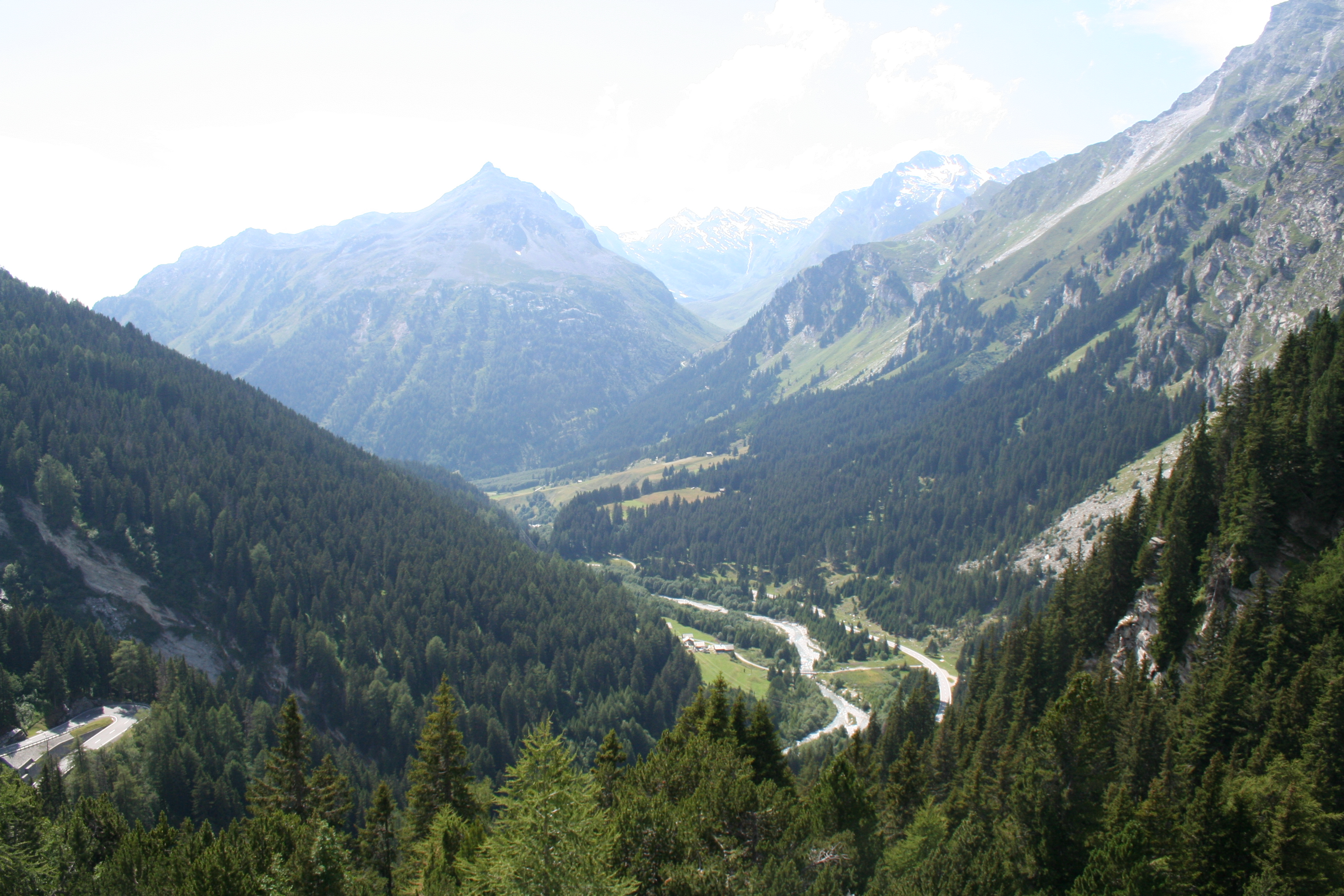 Blick vom Maloja in den obersten Teil des Bergell